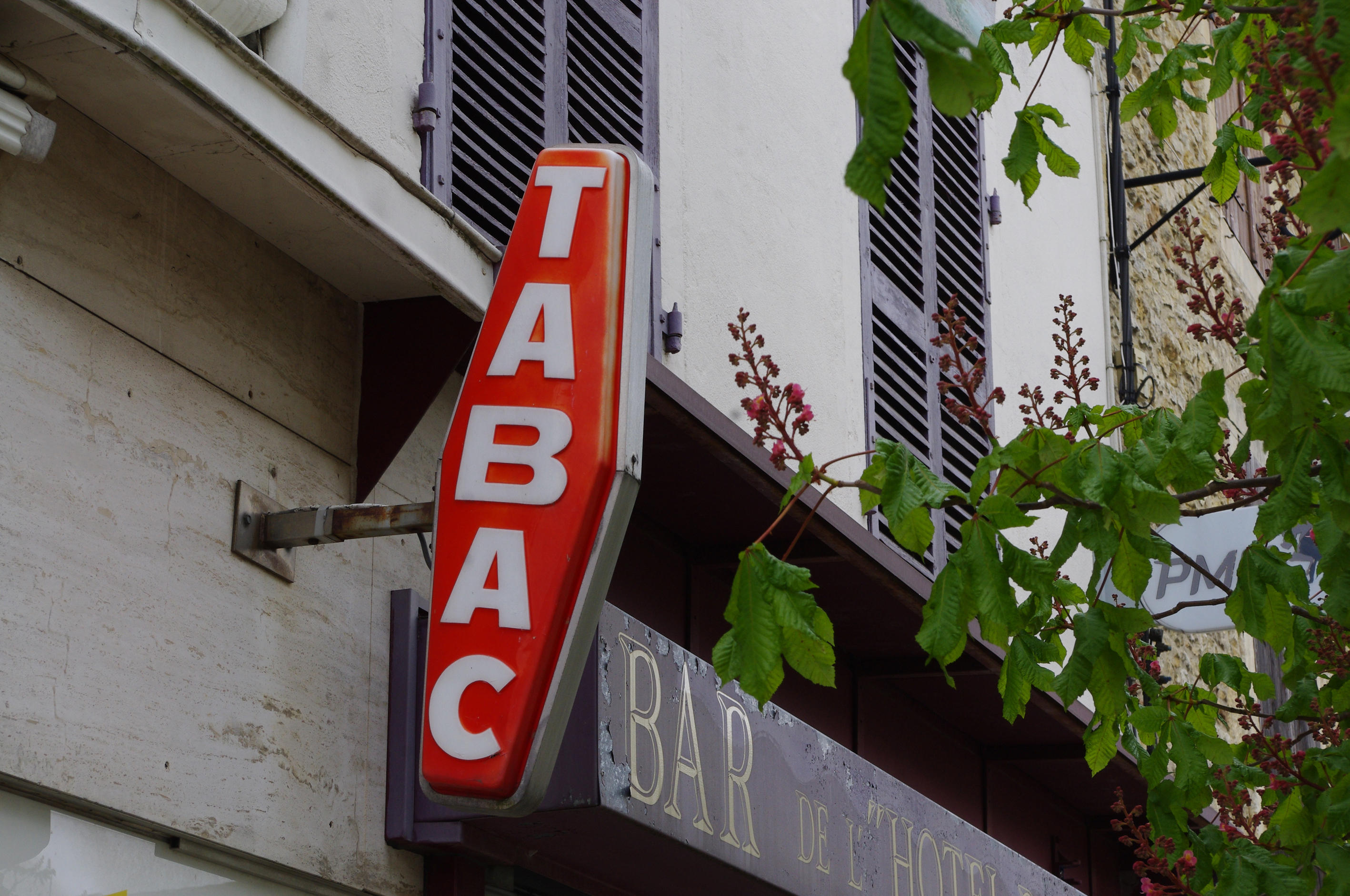 Carotte de bureau de Tabac, à Gençay, France